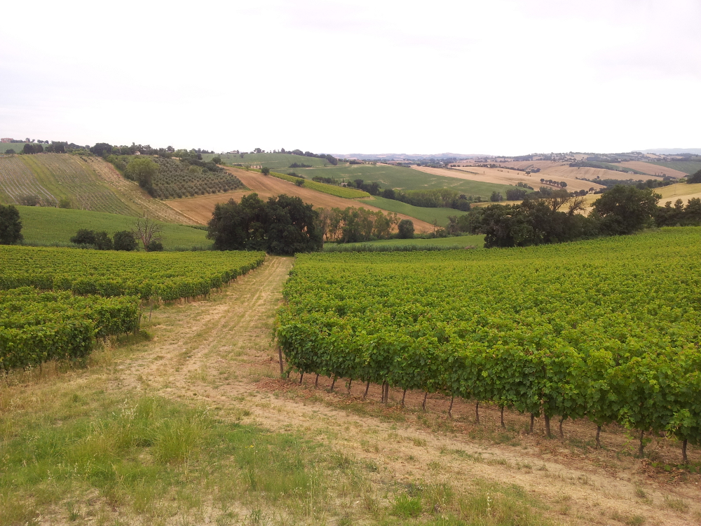 Vigna a Monte Roberto